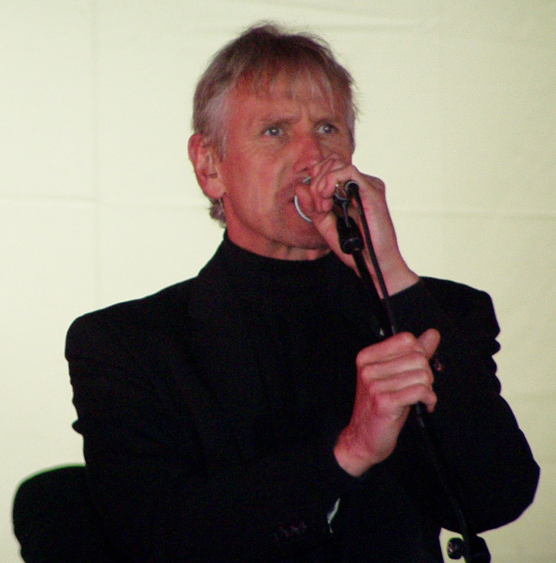 Steffen Brandt under tv-2 koncert på Knivholt i 2005.